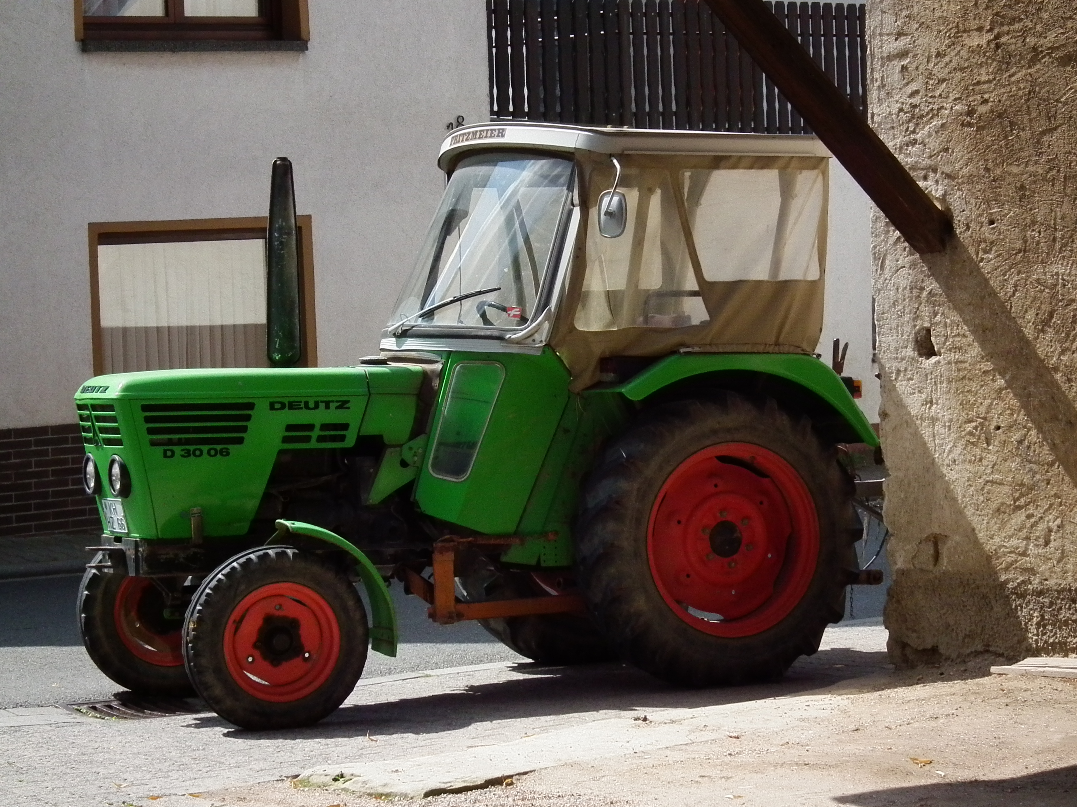 Traktor Deutz D 30 06, fotografiert in Waldlaubersheim (Rheinland-Pfalz, Deutschland)